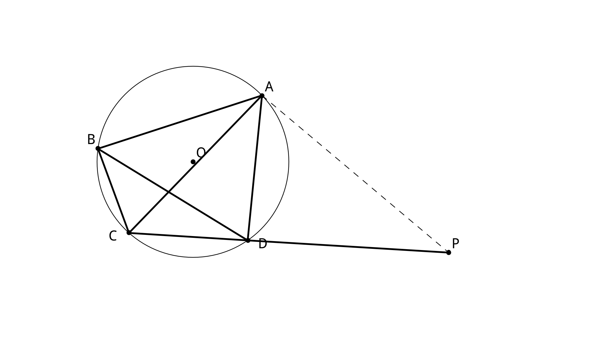 construção